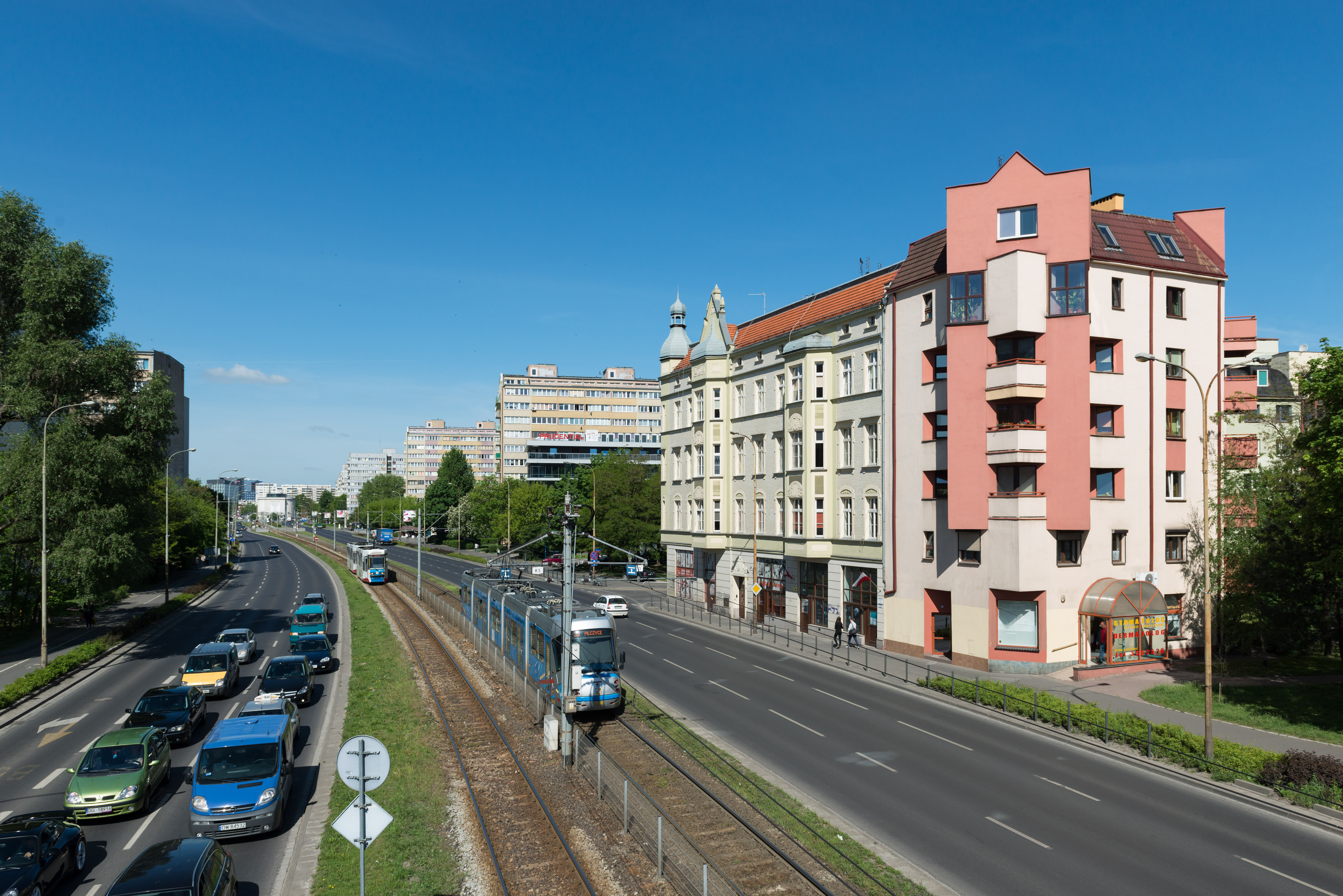 Ulica Legnicka we Wrocławiu. Widok z kładki w kierunku zachodnim.